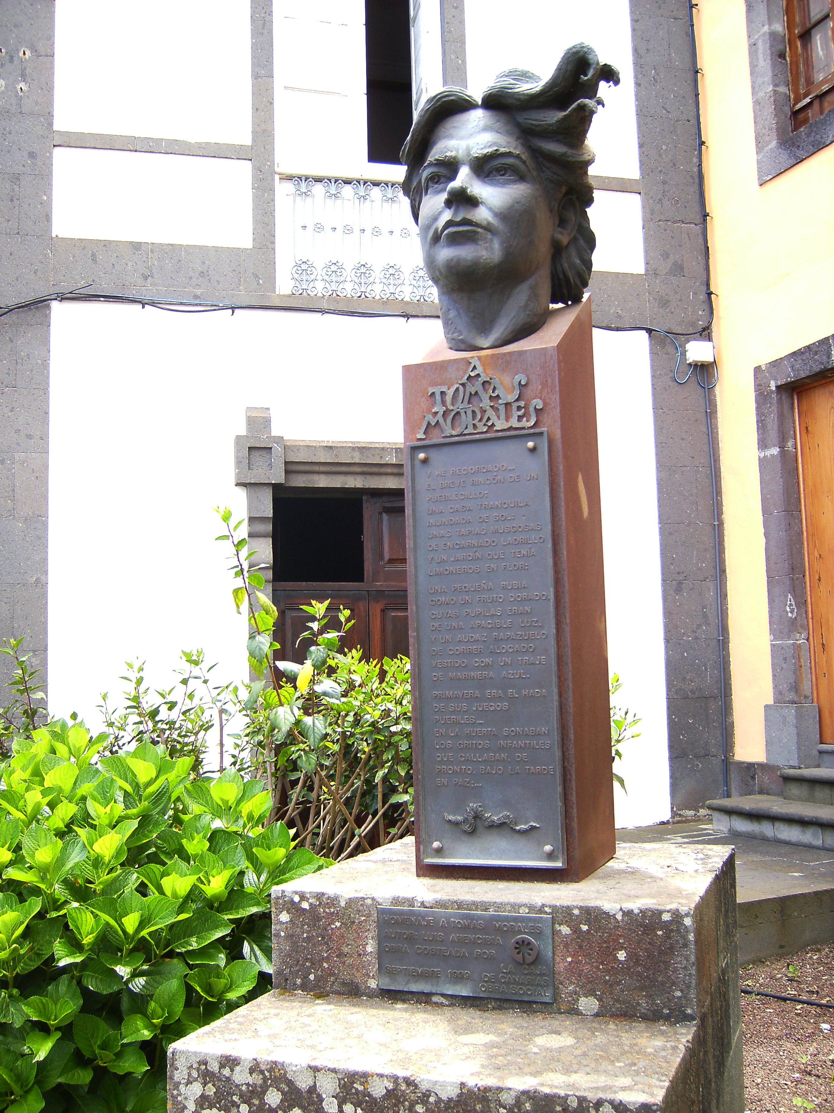 Foto del busto de Tomás Morales frente a su casa natal, hoy Casa Museo, en la localidad de Moya, Gran Canaria, Islas Canarias